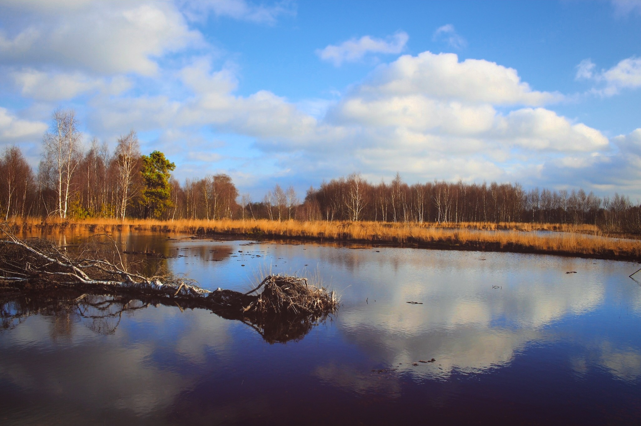 Auf diesem Foto sieht man ein Teil des riesigen Diepholzer Moores (NSG), das eine große Vielfalt an Pflanzen und Tieren bietet.